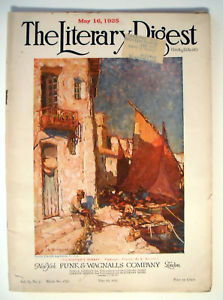 Revue de 1923 sur Louis Bonamici